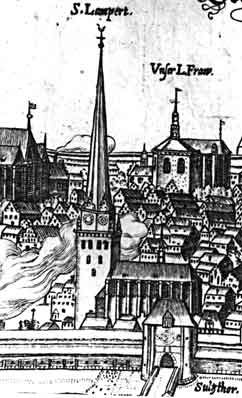 St. Lamberti in Lüneburg, vor dem Einsturz des Turmes 1703